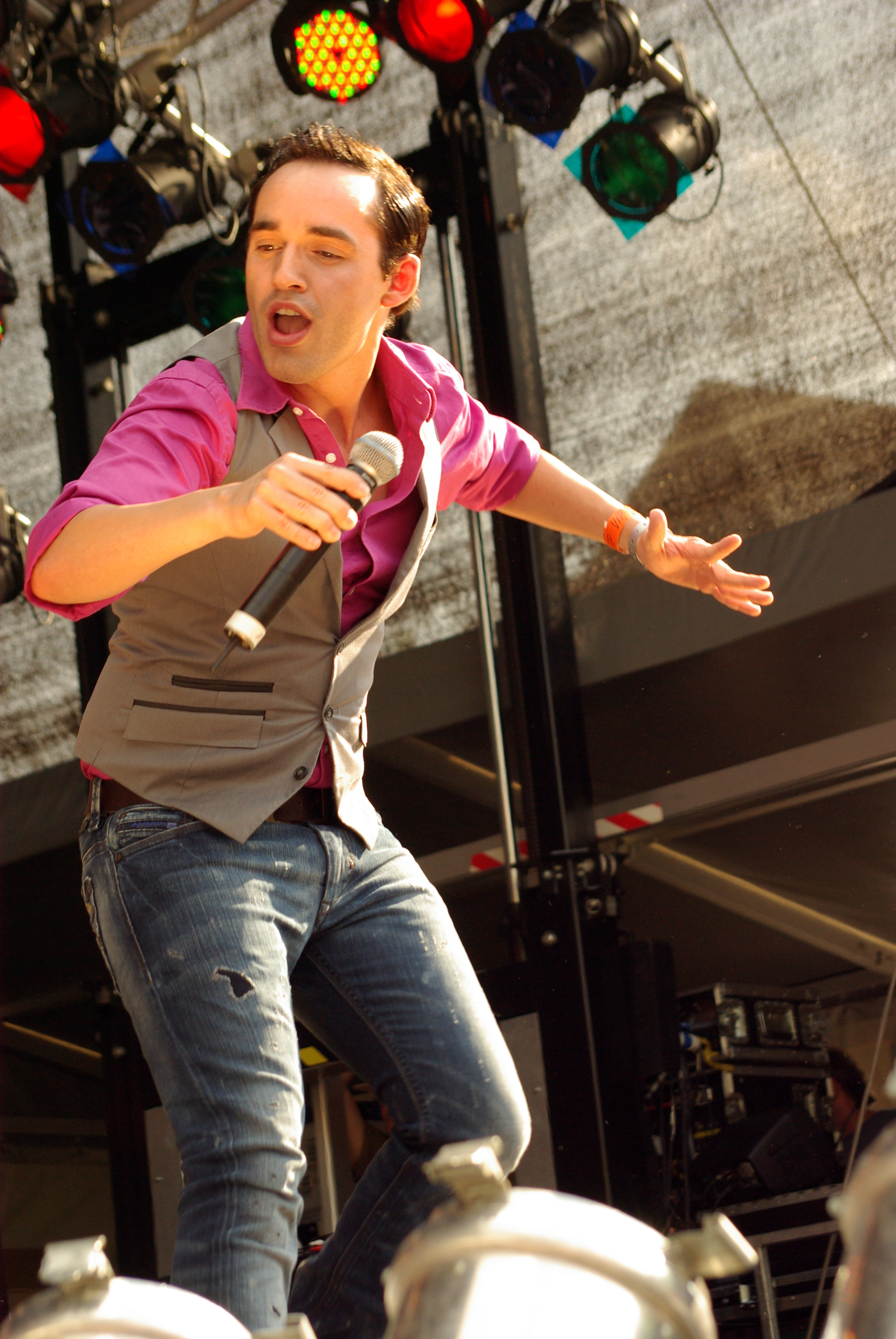 Daniel Küblböck CSD Köln 2009